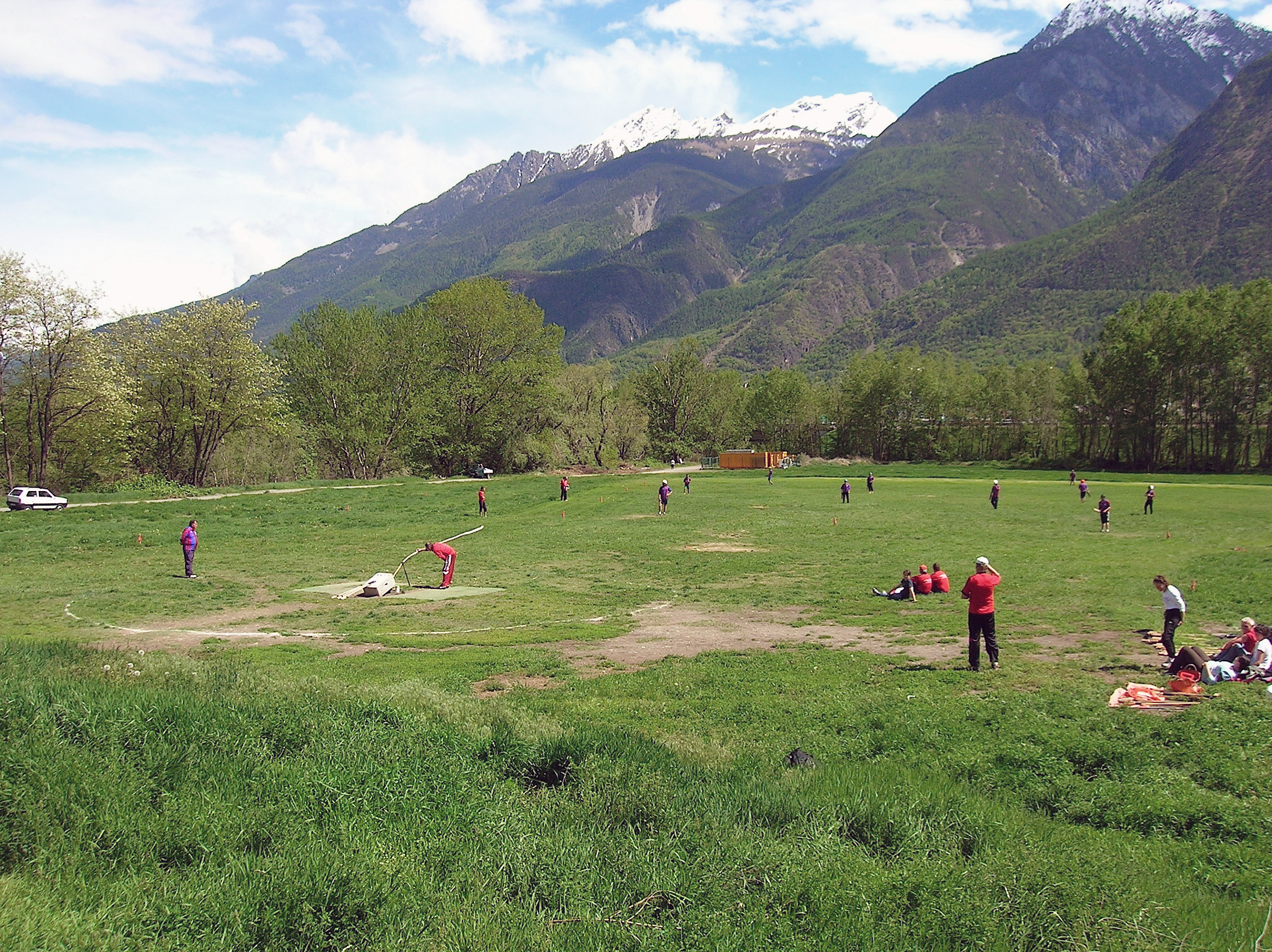 Una fase di una partita di tsan, in un campo di tsan nei pressi di Nus, loc. Plantayes, Valle d'Aosta, Italia. Un giocatore posiziona lo tsan sulla pertze per la tsachà; gli altri giocatori, con i loro boquet in mano per intercettare il colpo, attendono che il battitore colpisca lo tsan con il suo baquet.